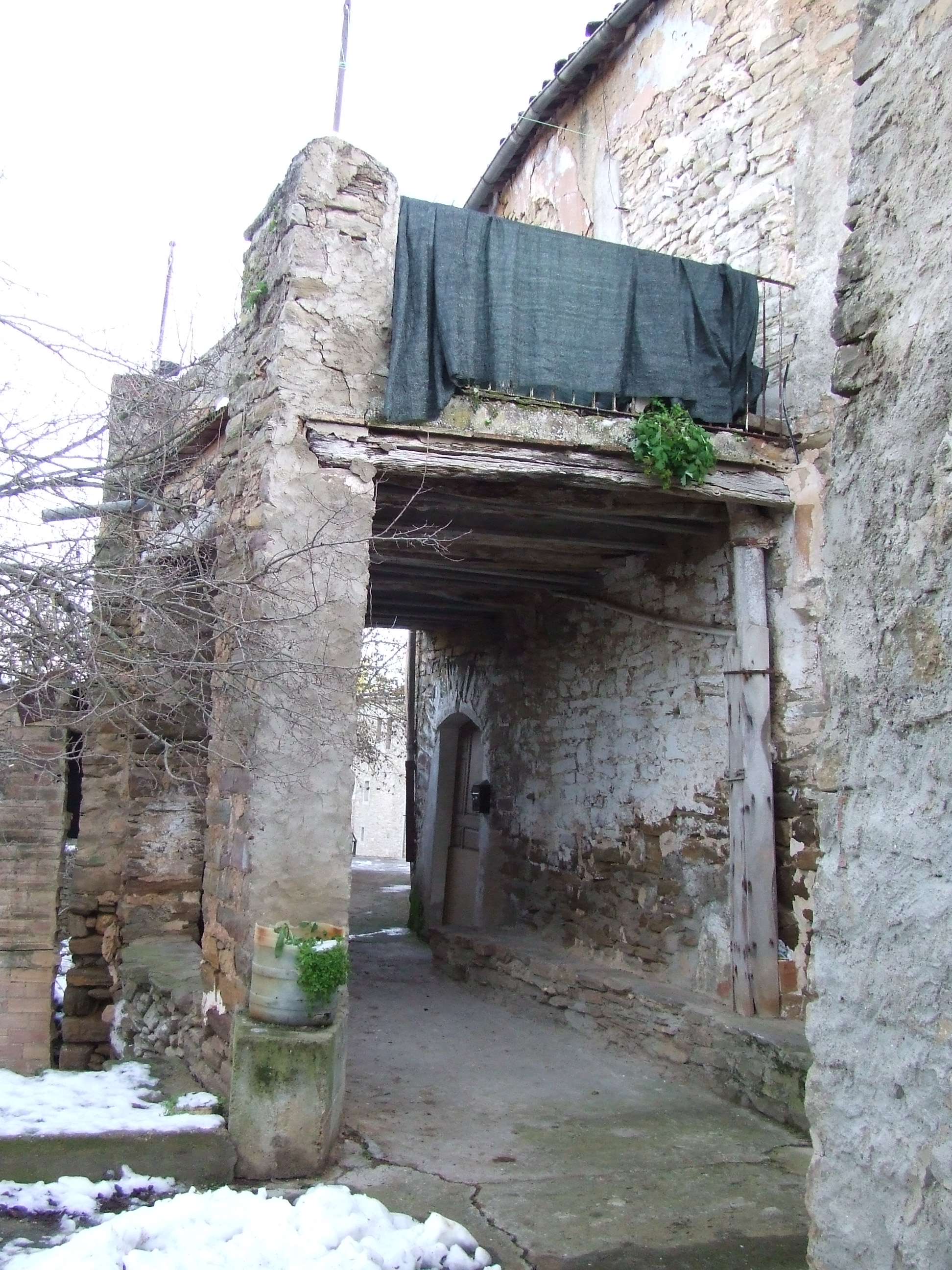 Restes dels accessos al poble clos de Gavet (Sant Serni, Gavet de la Conca, Pallars Jussà)